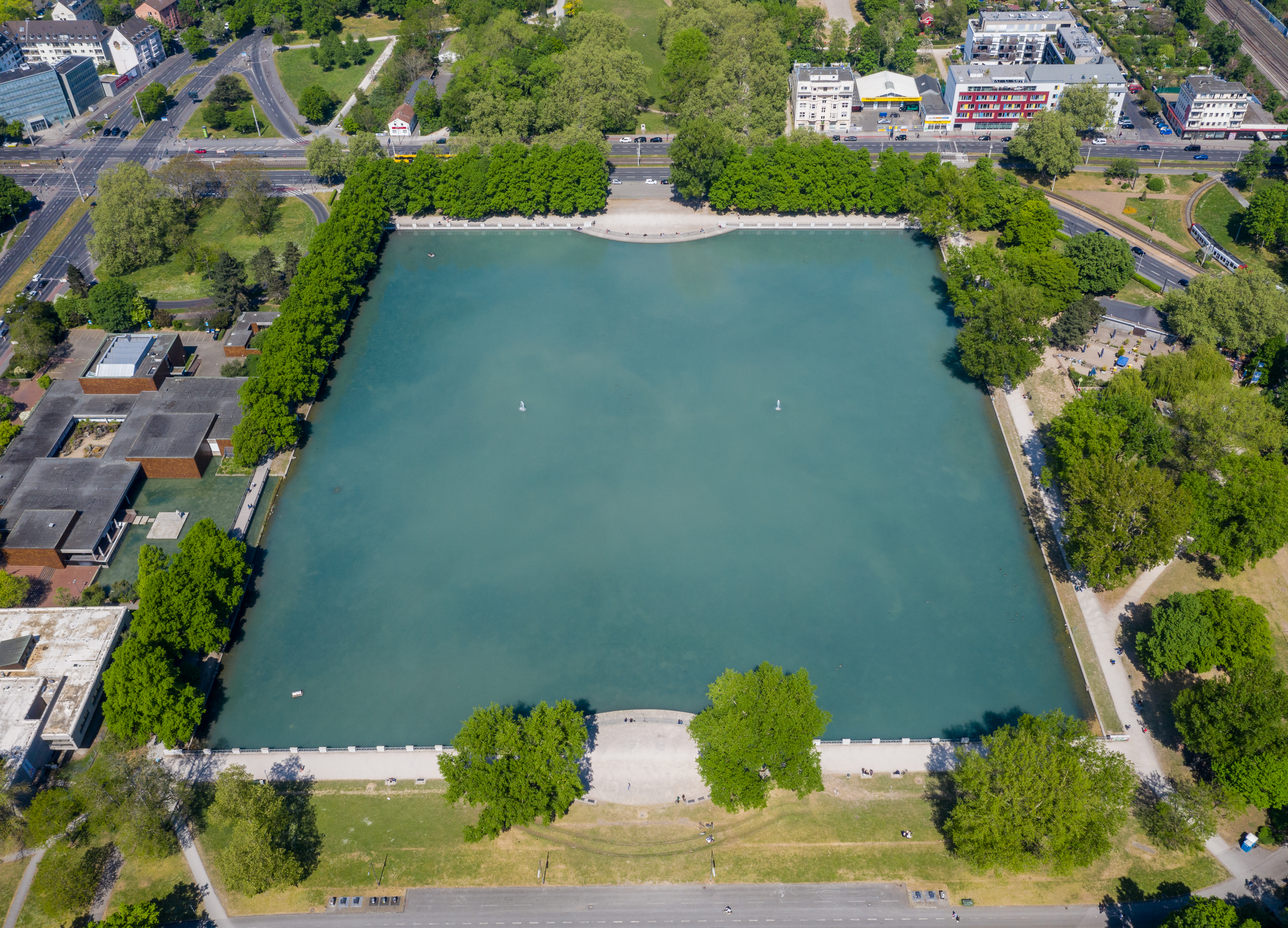 Aachener Weiher Köln, Luftbild aus 200 m Höhe (mit Genehmigung der Stadt Köln, der Bezirksregierung und der Deutschen Flugsicherung im Tower Köln)